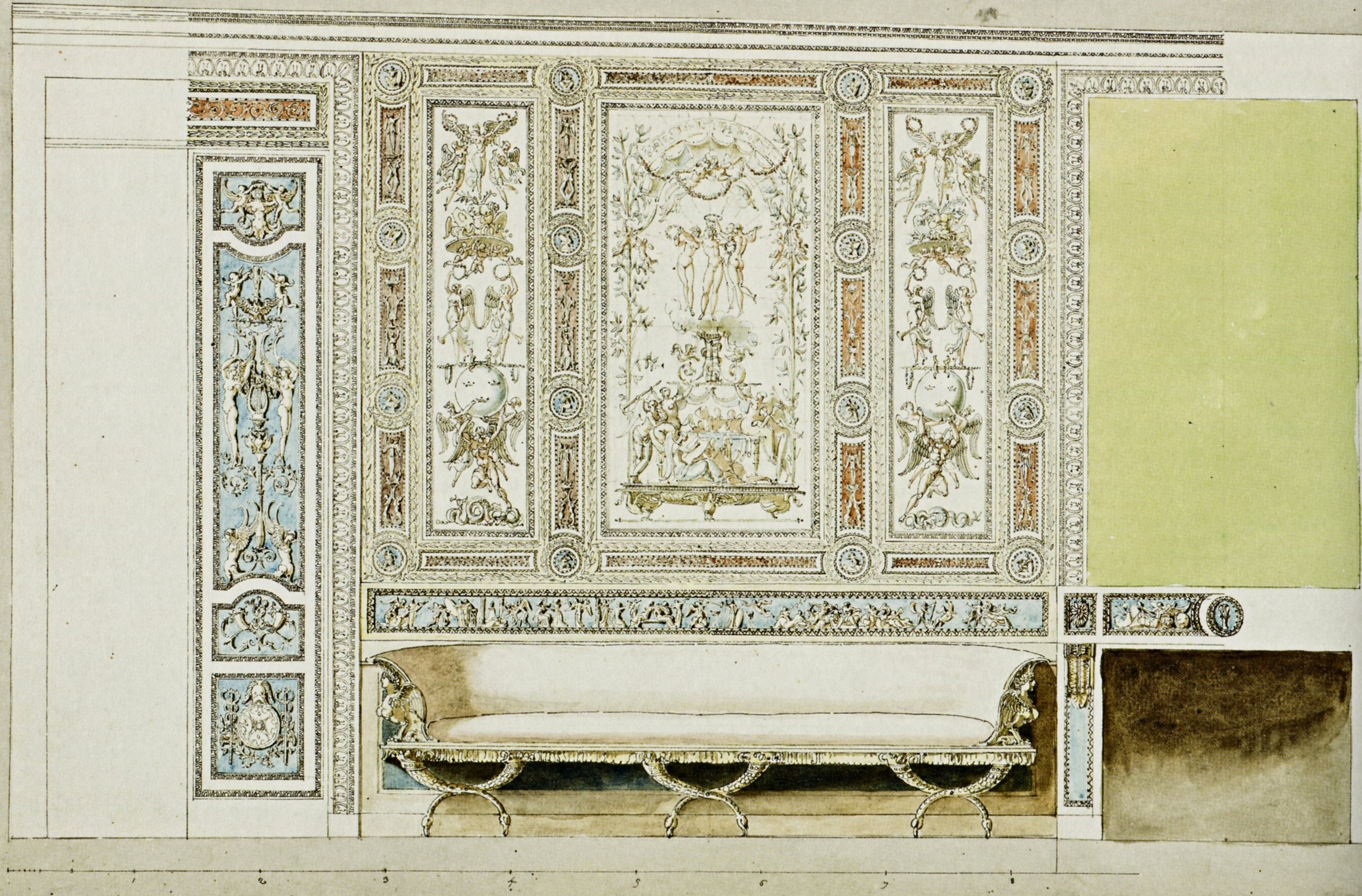 Gustav III:s paviljong, ritning till Stora salongens dörrar och eramverk